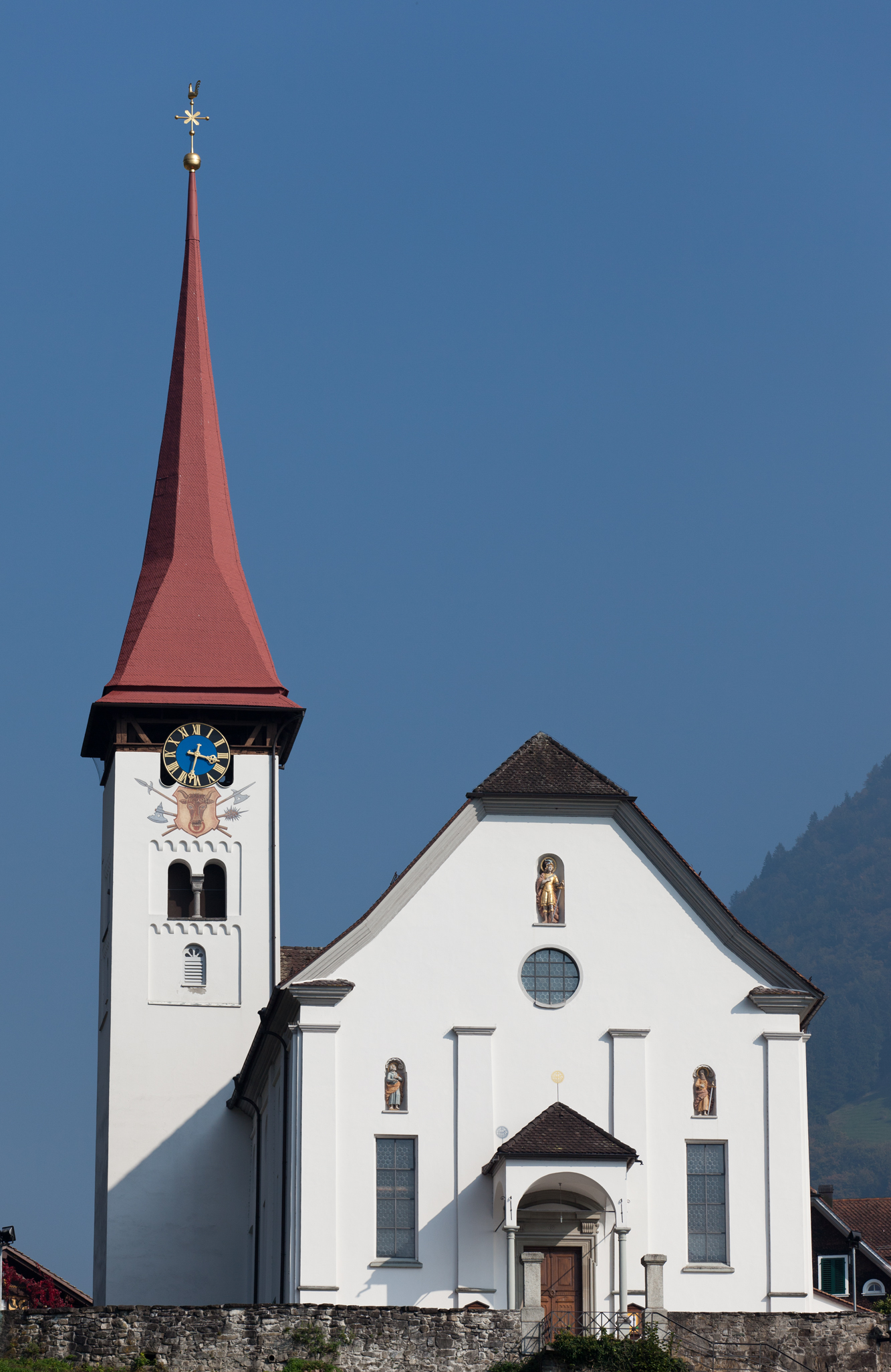 Pfarrkirche von Bürglen (UR)